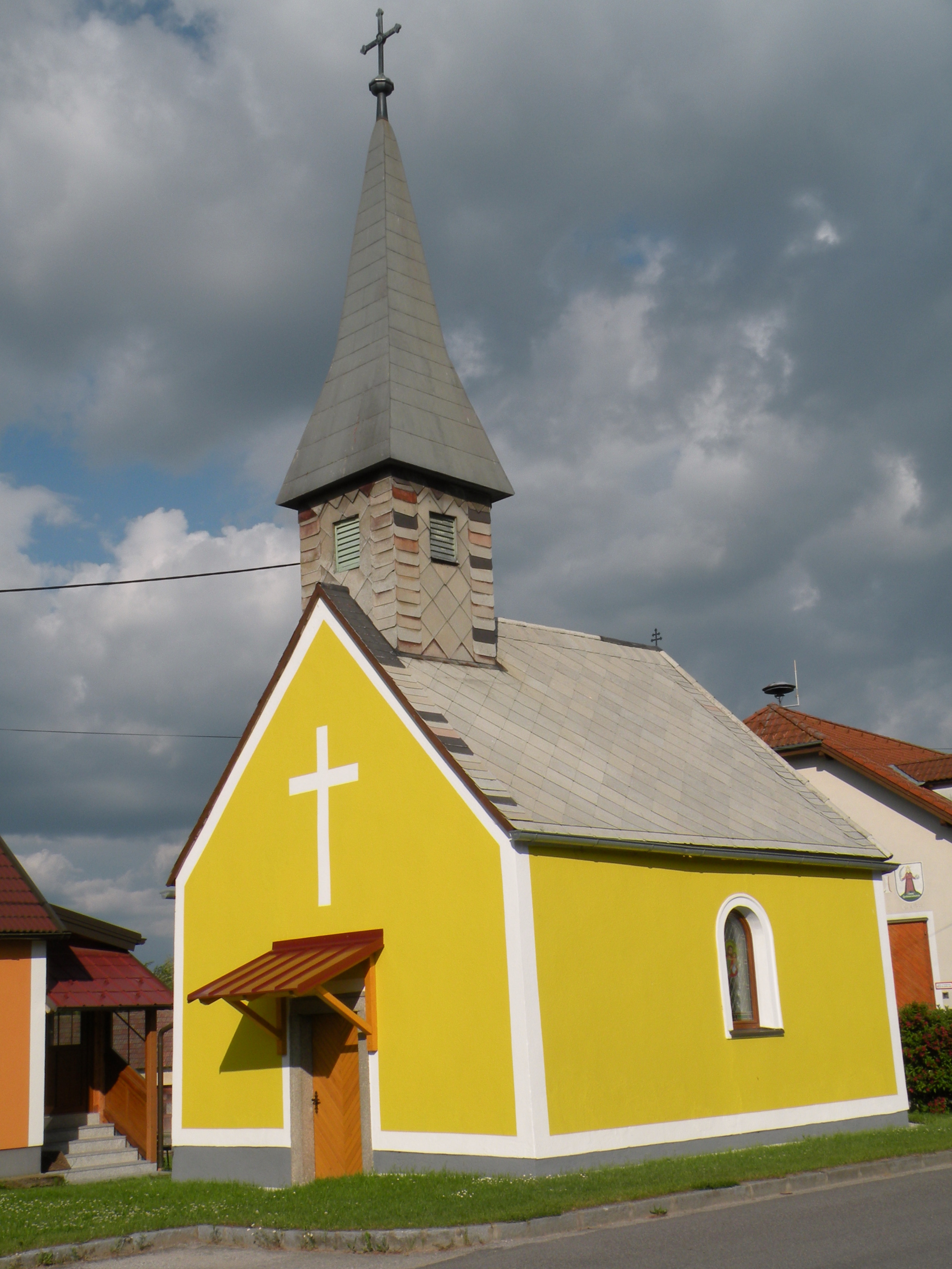 Kapelle in Haslau, Stadtgemeinde Heidenreichstein